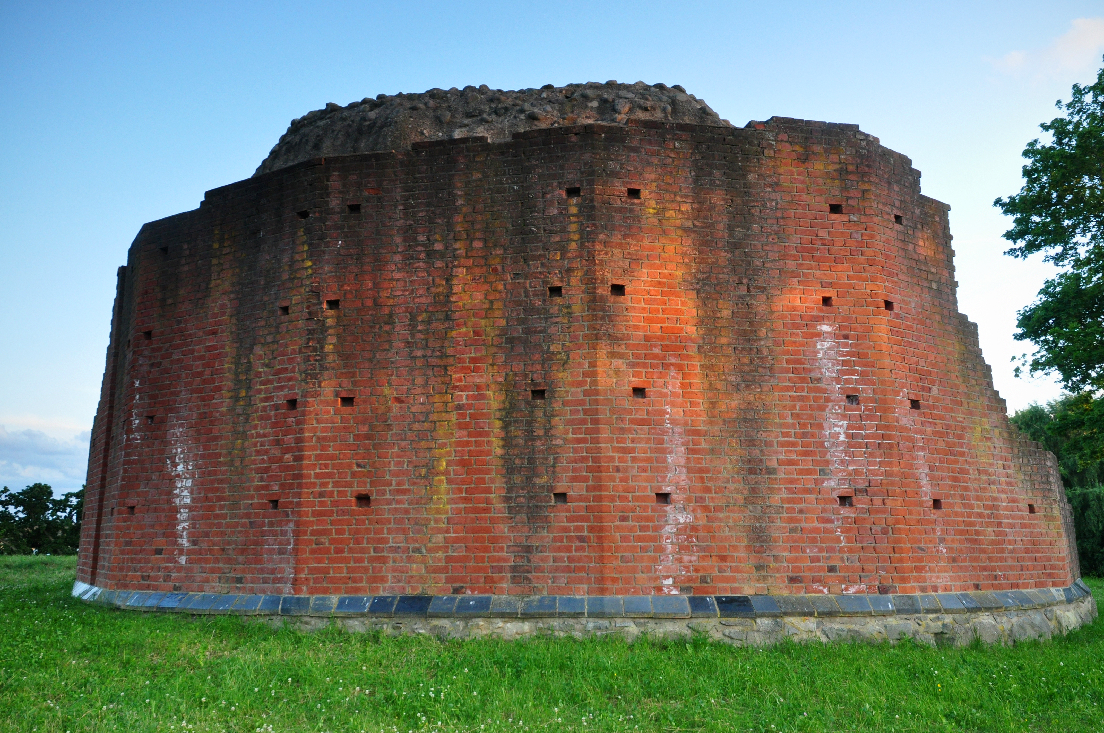 Sölvesborgs slott är en borgruin i Sölvesborgs socken i Sölvesborgs kommun. I folkmun har den kommit att kallas slottet. Borgruinen ligger ca femhundra meter nordost om själva den medeltida stadskärnan i Sölvesborg.